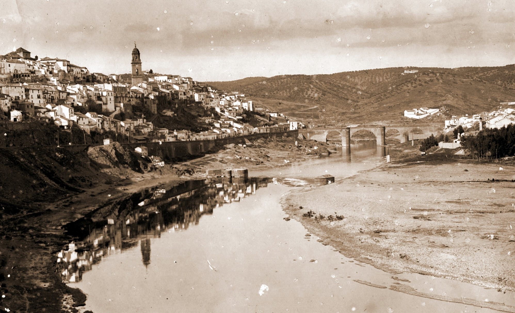 Fotografía antigua de la ciudad cordobesa de Montoro a inicios del S.XX.